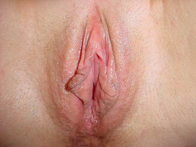 Female external genitalia